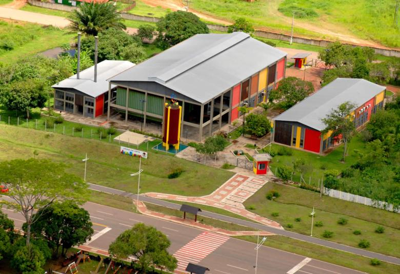 Usina de Arte João Donato, em Rio Branco - Acre